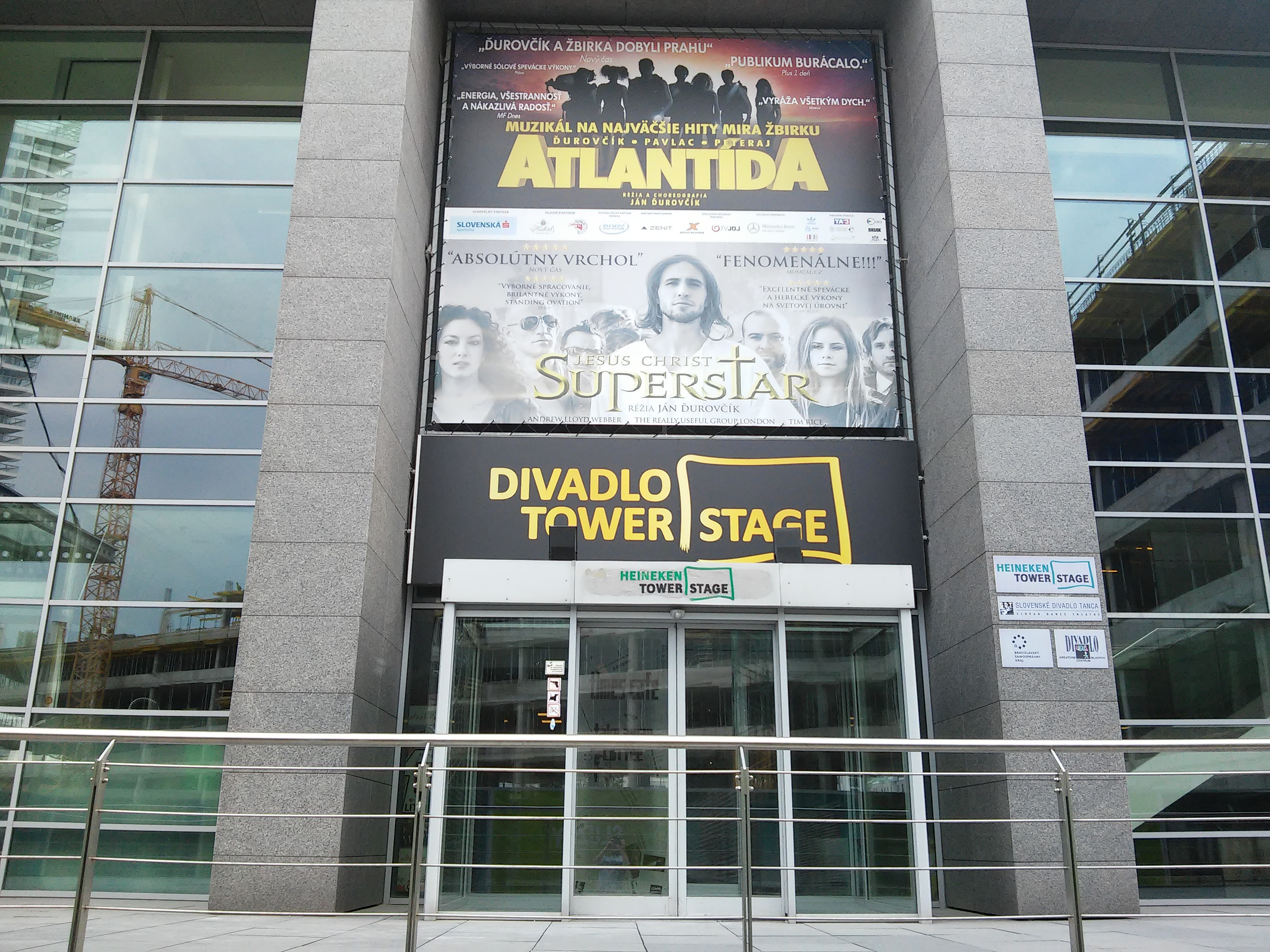 Heineken Tower Stage, Staré Mesto, Bratislava